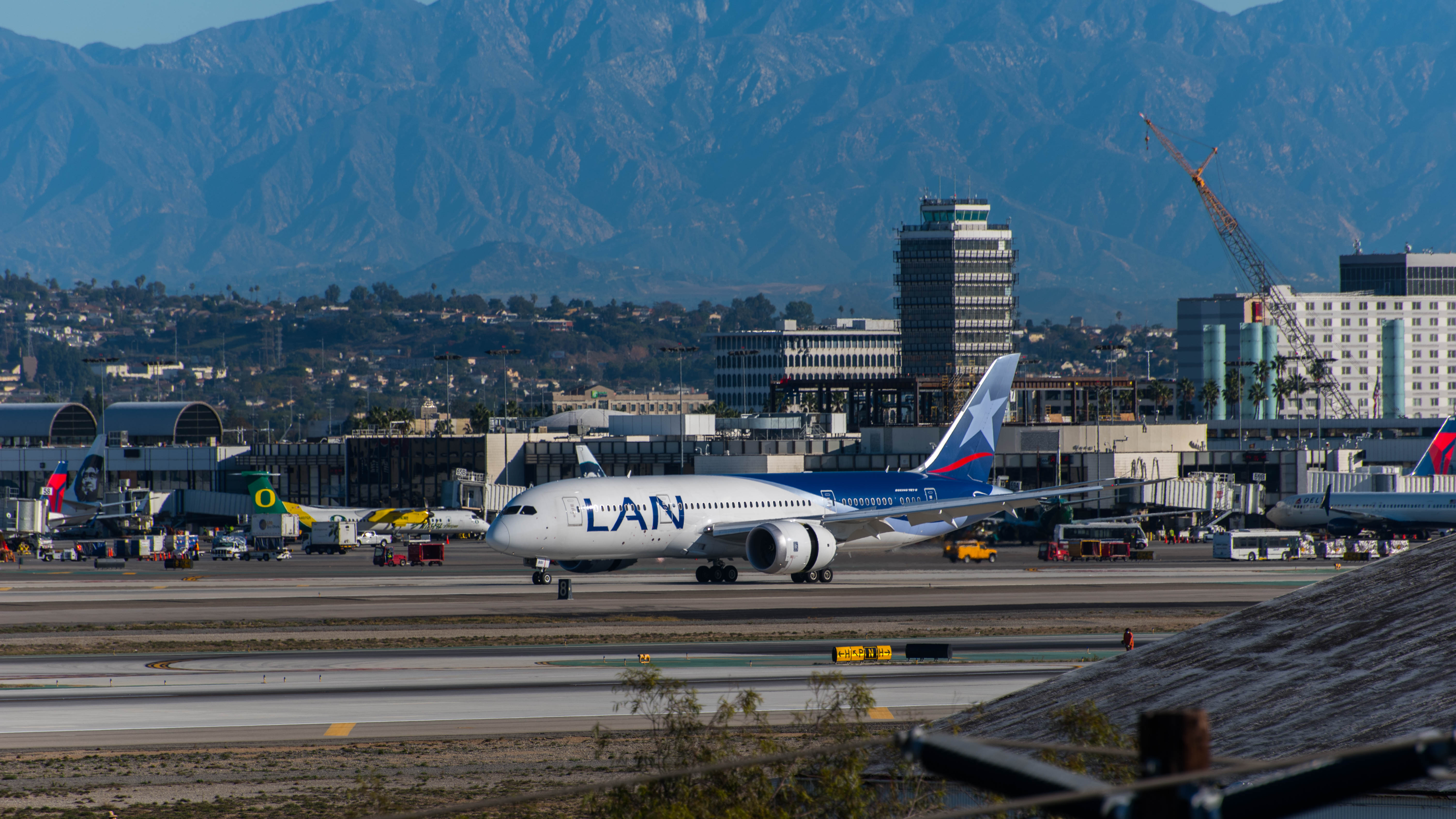 LAN Airlines Boeing 787-8 Dreamliner at LAX